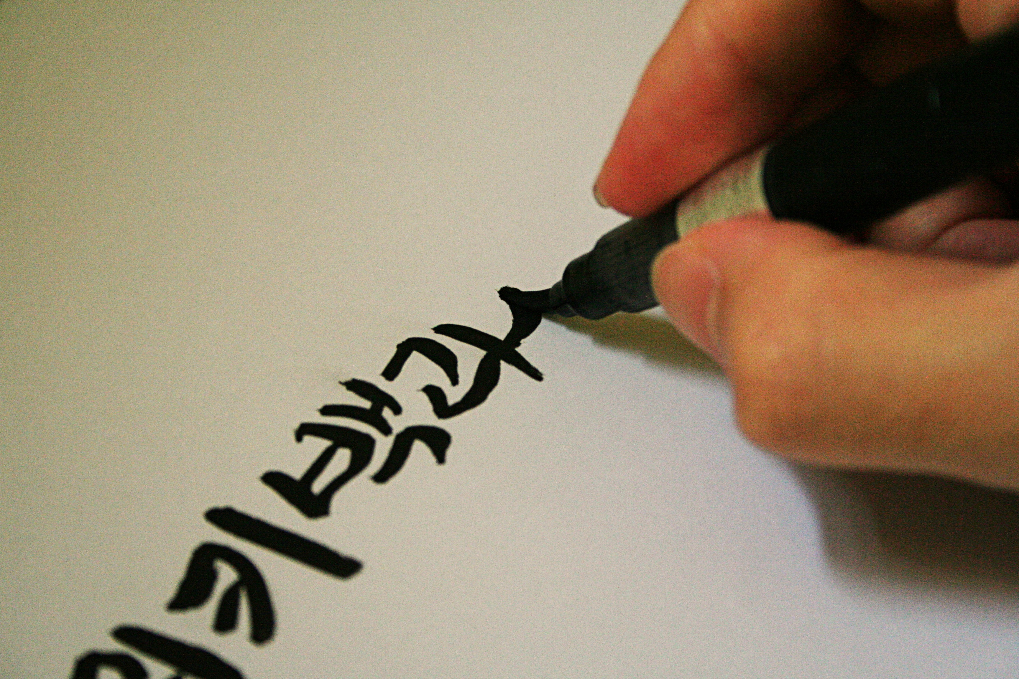 붓펜을 사용하여 종이에 '위키백과'라는 글씨를 쓰는 모습임.